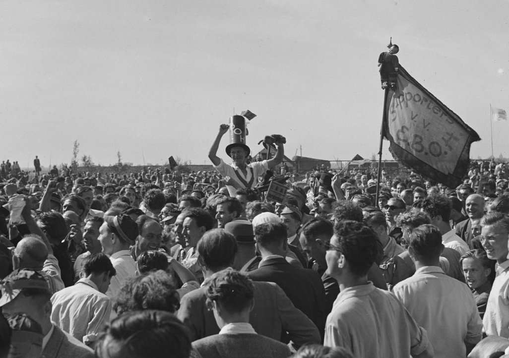 Huldiging EBOH uit Dordrecht na winst beslissingswedstrijd van Volendam waarmee promotie naar de 1e klasse bereikt wordt.